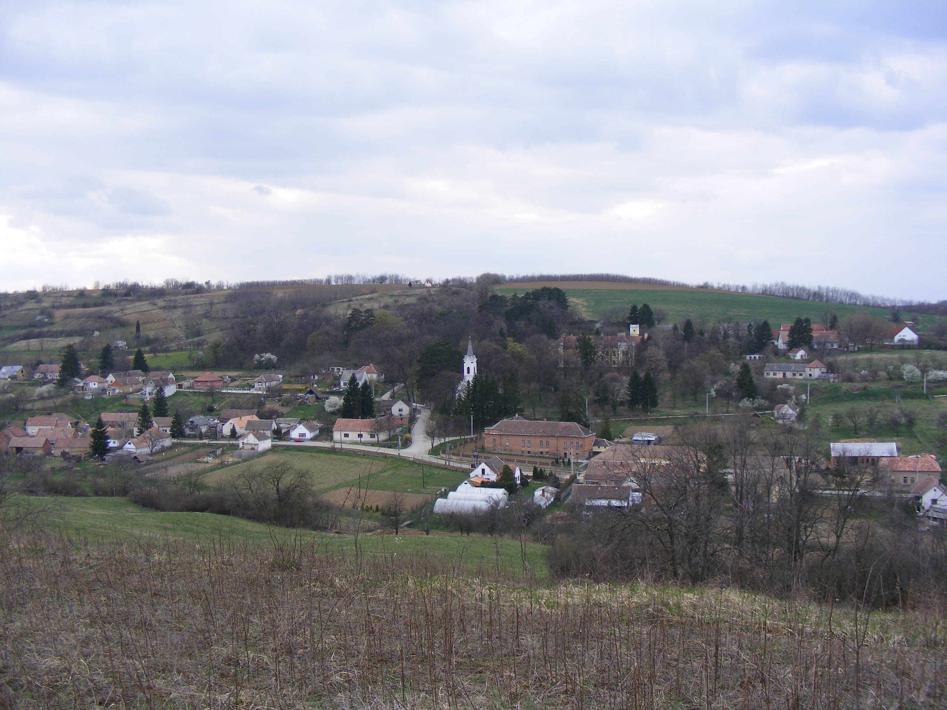 Bakóca a szőlőhegyről